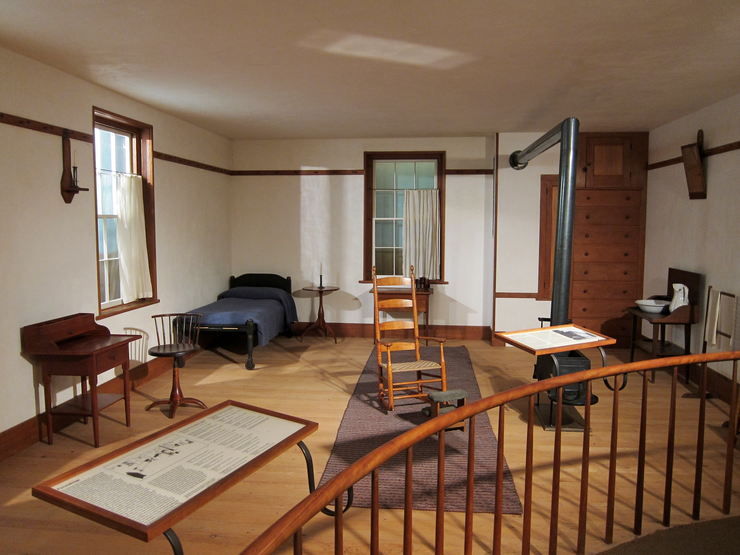 A Shakers' room in the Met of New York.